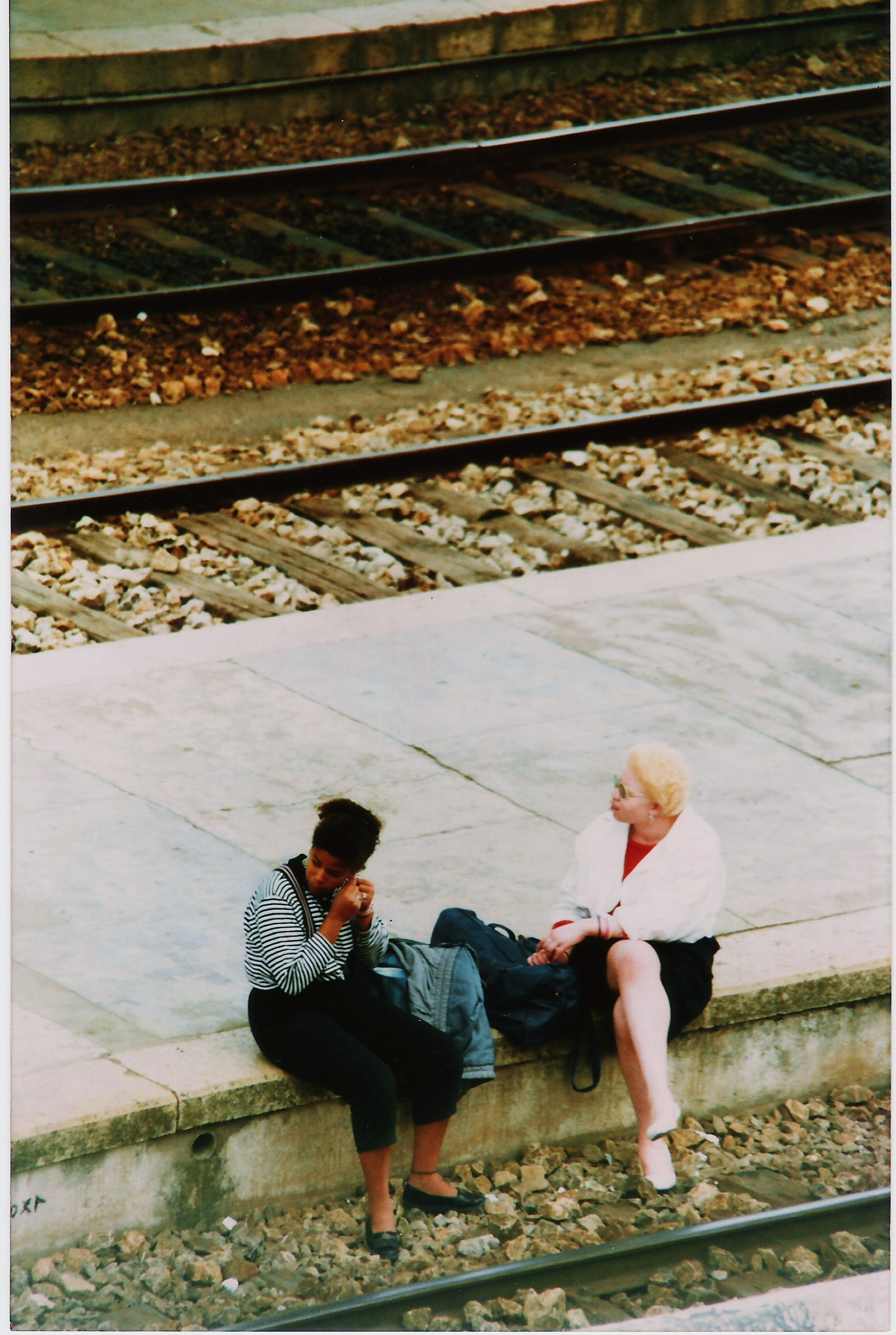 Foto analógica digitalizada (1988).